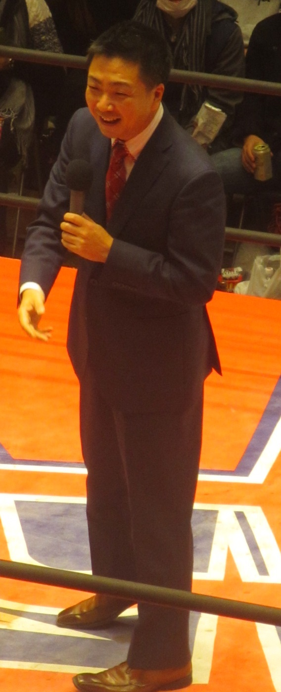 登坂栄児（大日本プロレス代表取締役社長）2019年12月30日 大日本プロレス後楽園ホール大会